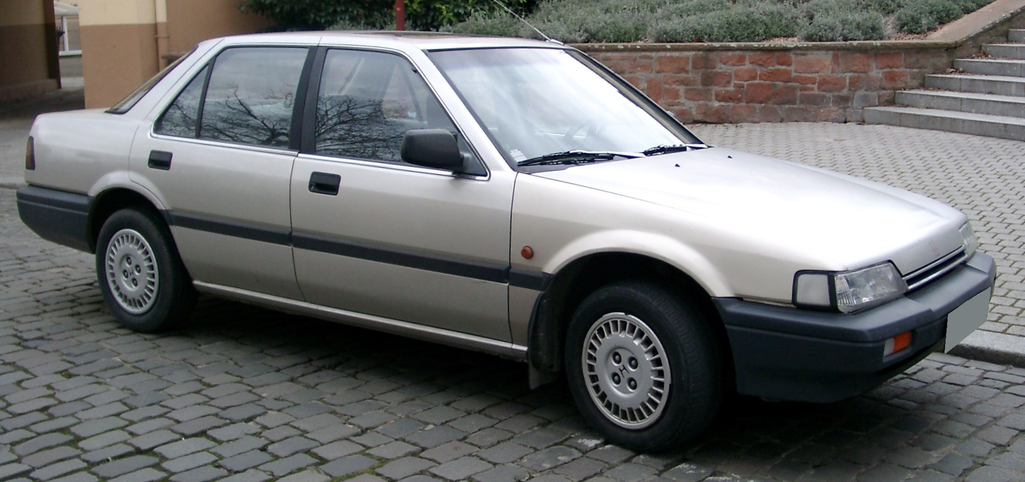 Honda Accord, 3. Generation